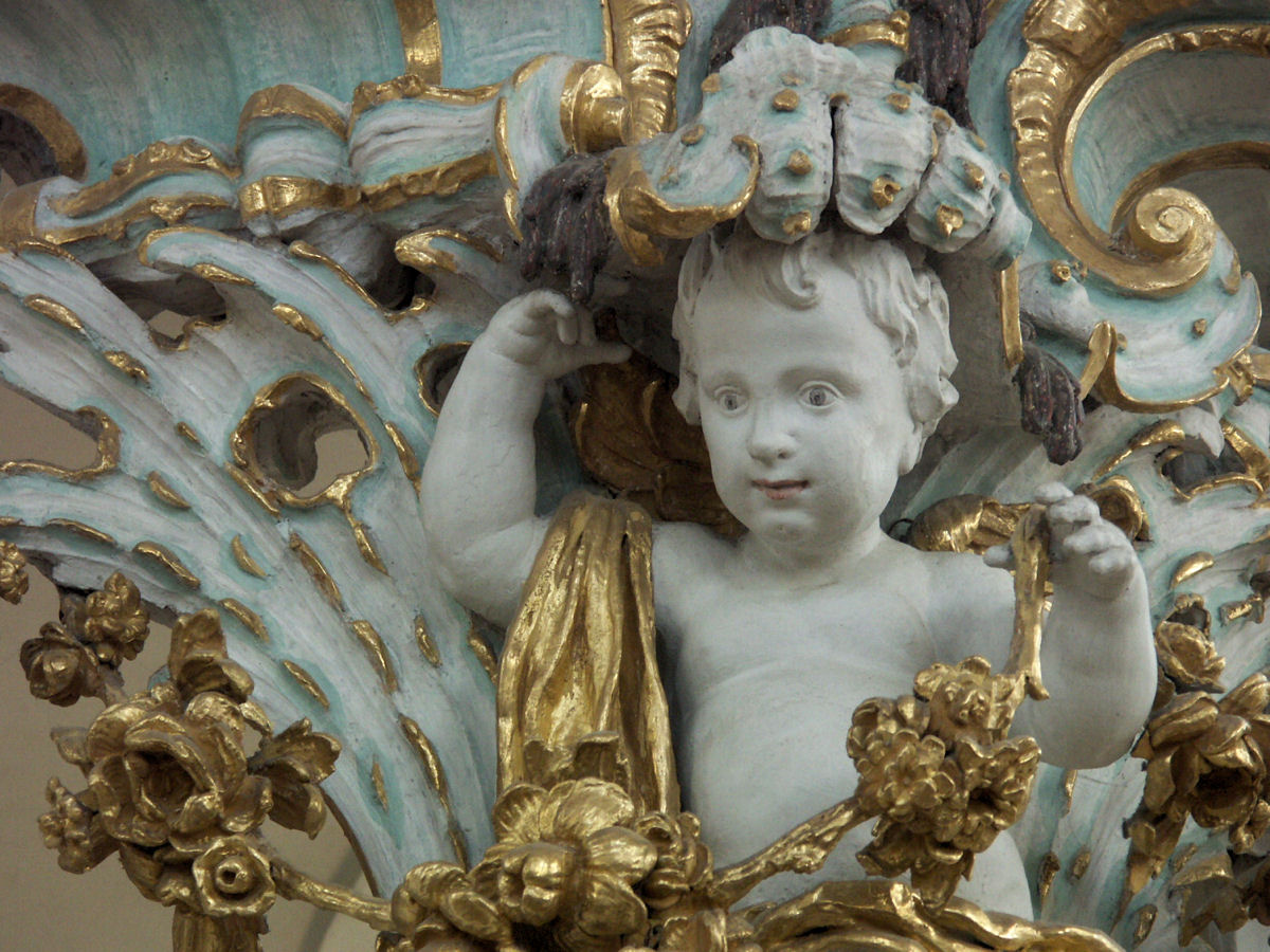 Wies church (Wieskirche), Germany - Pulpit (Detail)